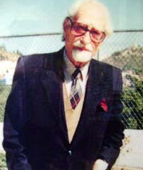 zacatecano